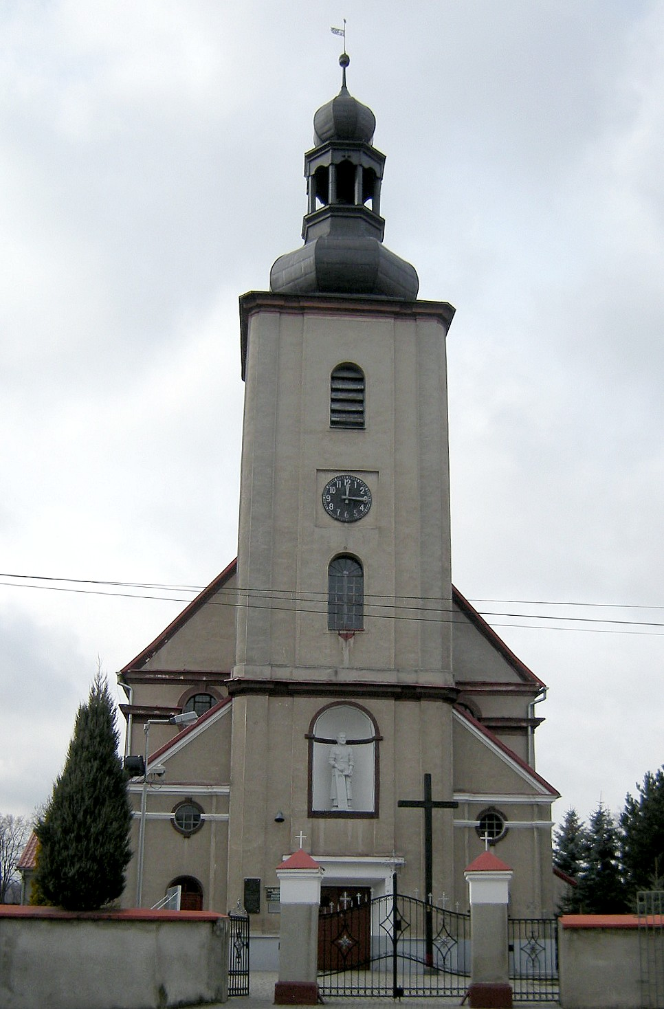 Bodzanów - kościół parafialny p.w. św. Józefa, XVIII, pocz. XIX w. (zabytek nr 30/50 z 20.02.1950)